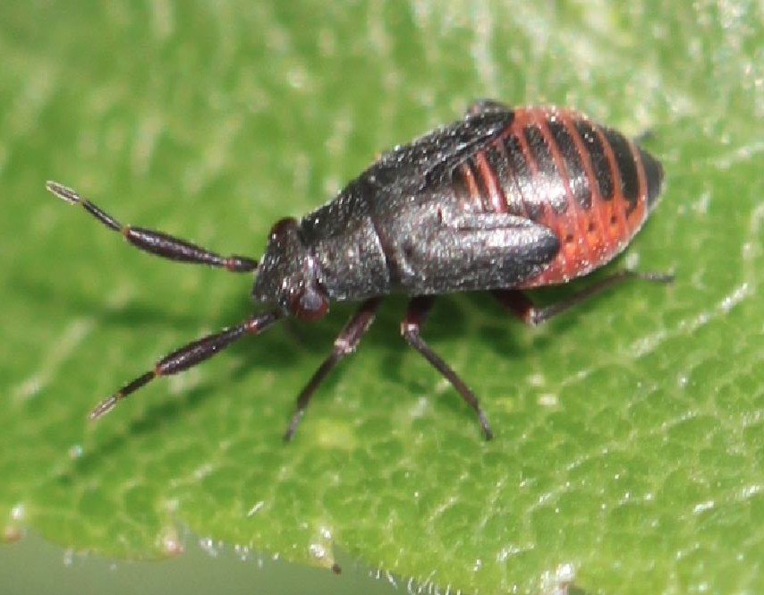 Weichwanzennymphe Heterocordylus tumidicornis am 22. Mai 2019 in Walldorf/Baden